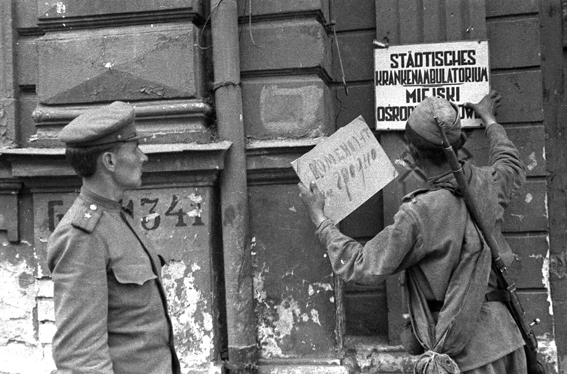 Einrichtung der Stadtkommandantur Grodno durch sowjetische Soldaten in einem Krankenhaus